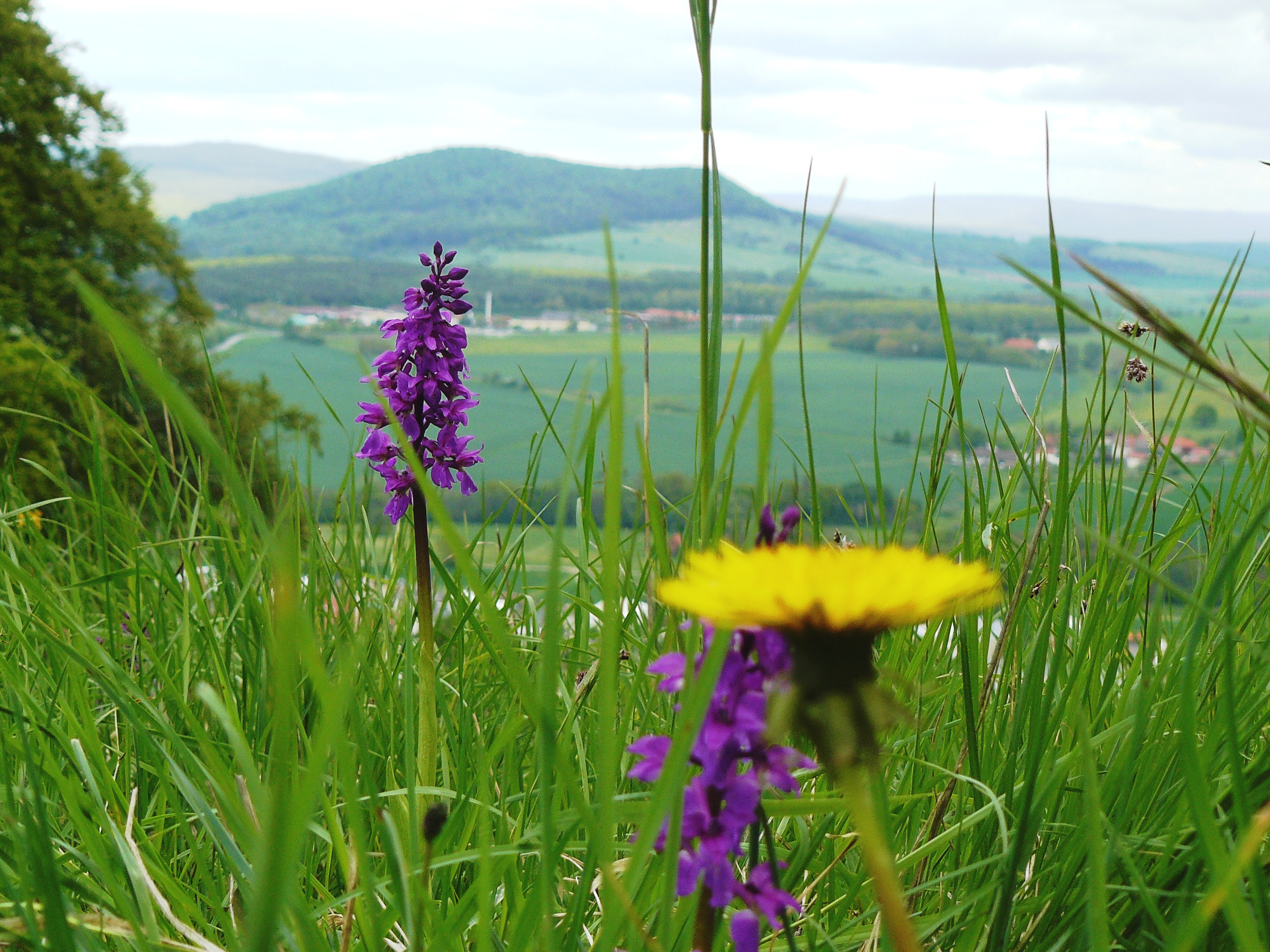 NSG Horn mit Kahlköpfchen, von Karl-Friedrich-Stein aus fotografiert (LSG Thüringische Rhön)